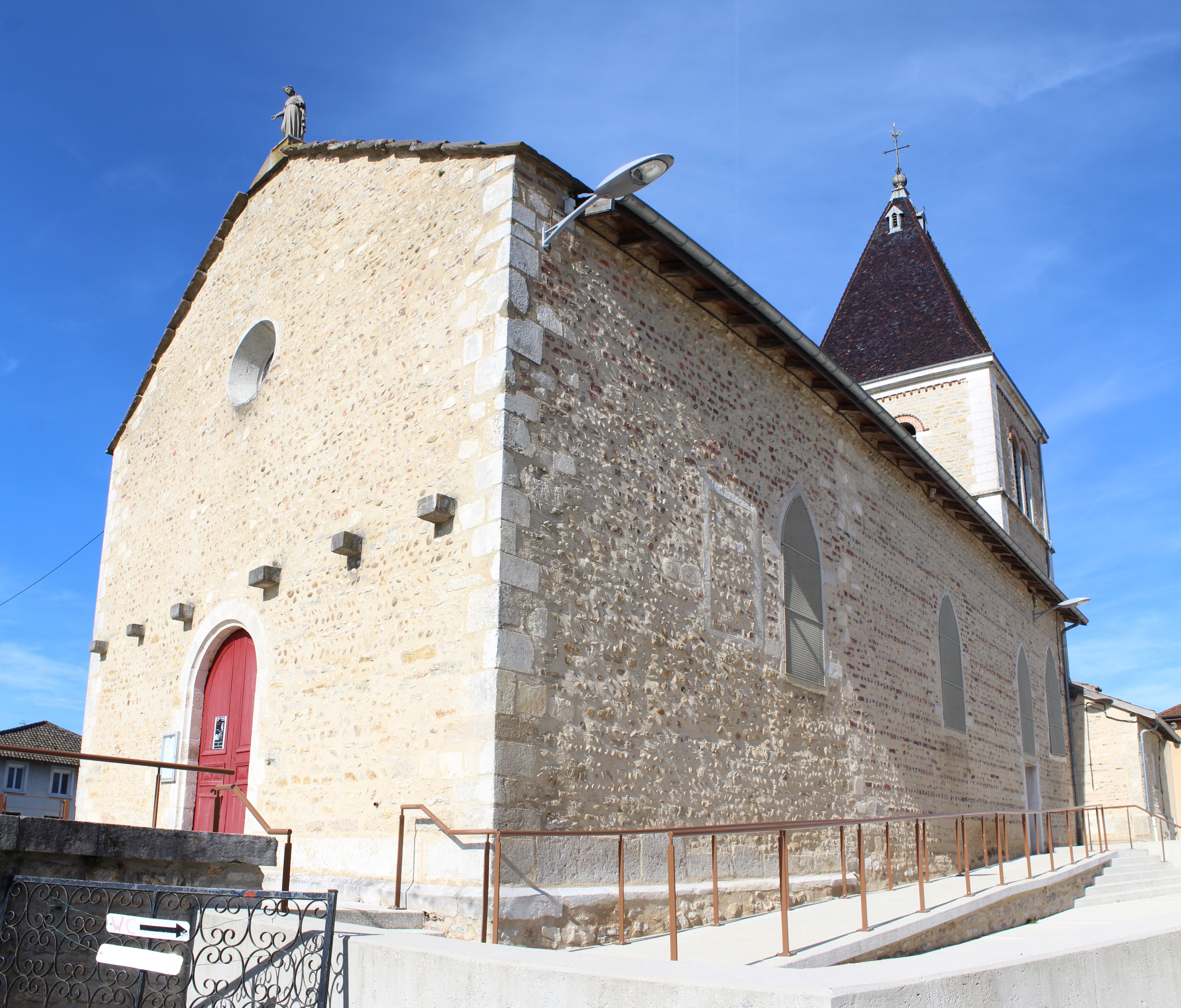 Église Saint-Maurice de Dompierre-sur-Veyle.